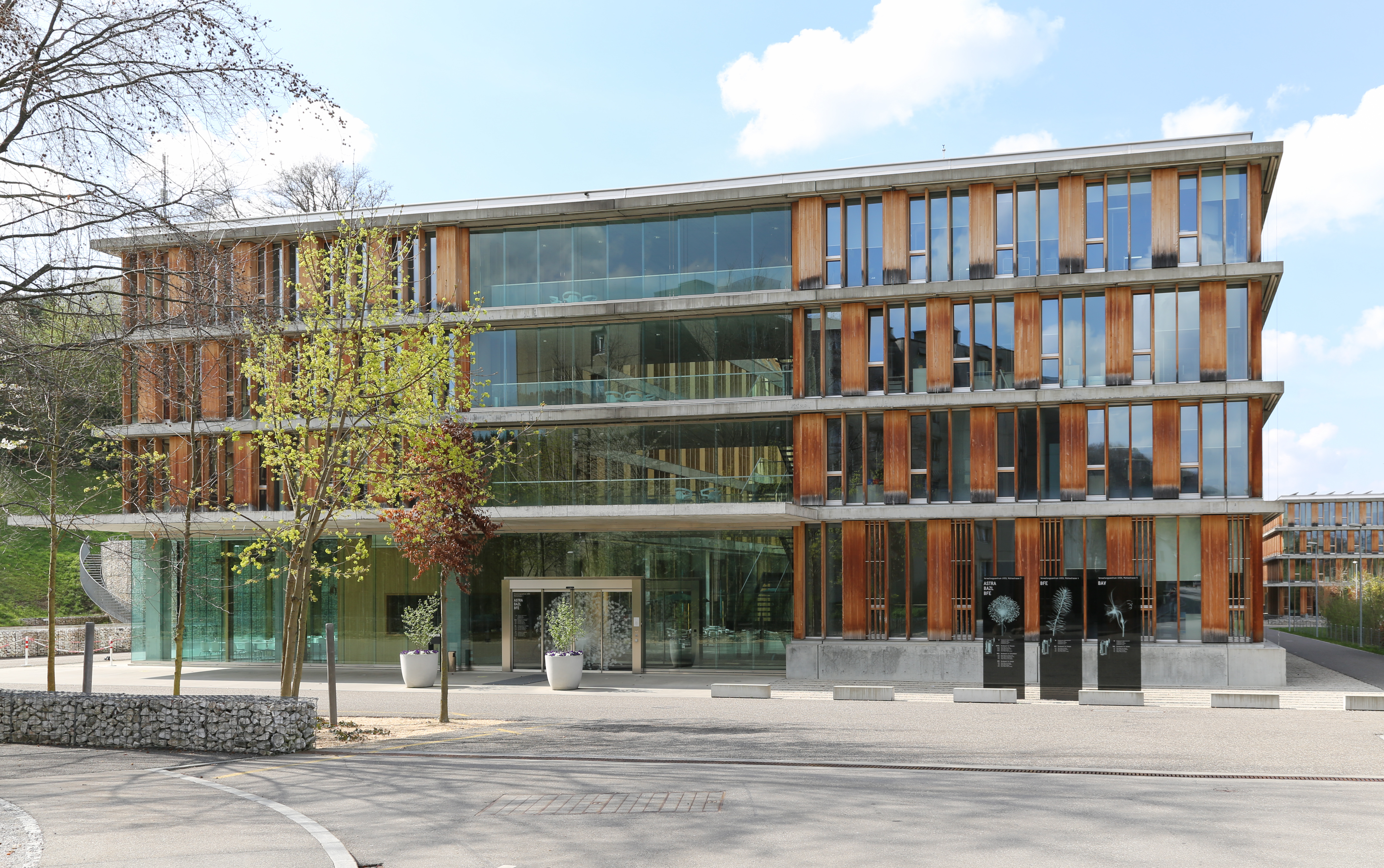 Gebäude der Bundesämter für Strassen (ASTRA), Zivilluftfahrt (BAZL) und Energie (BFE) in Ittigen, Ansicht aus südöstlicher Richtung